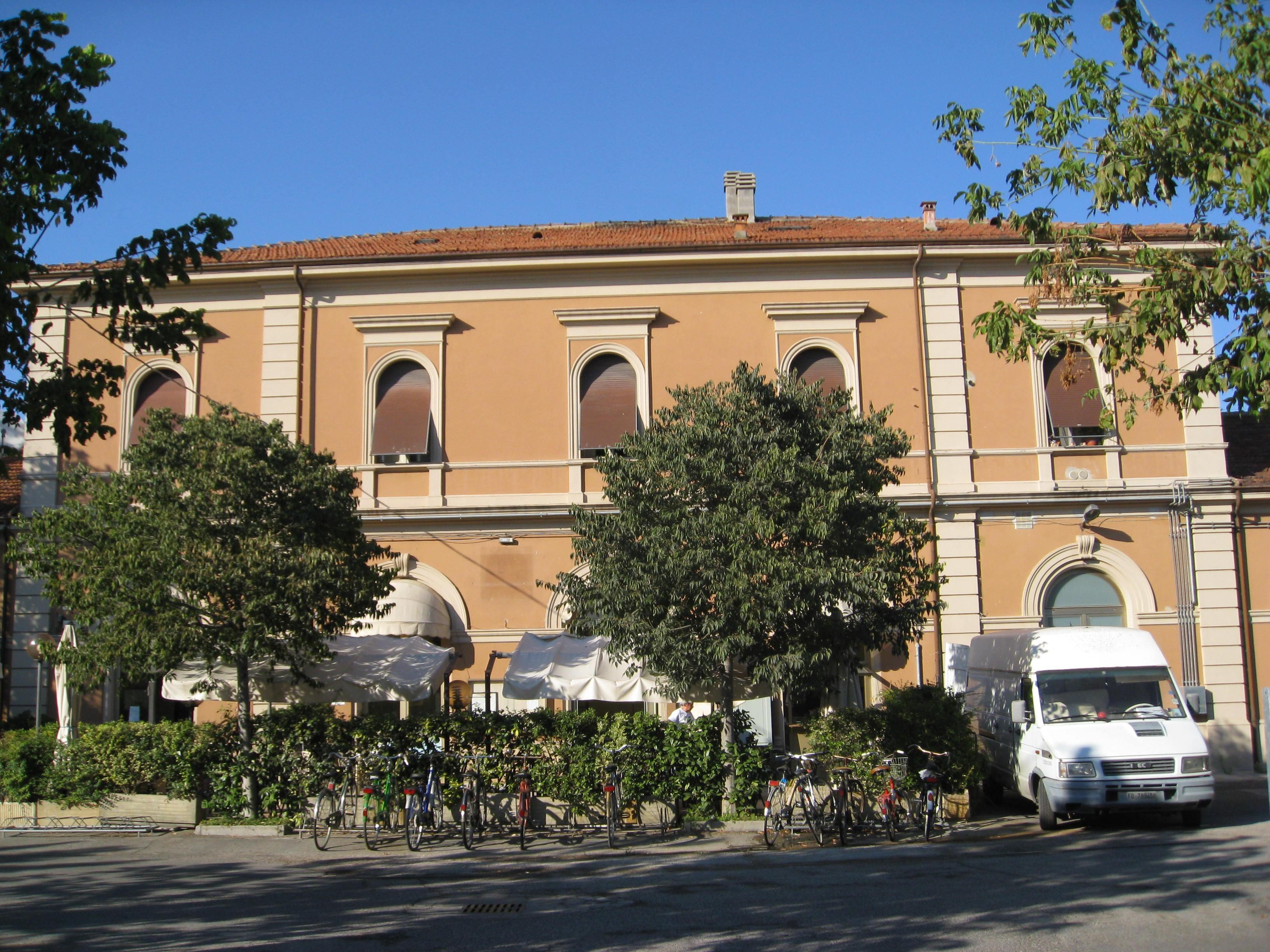 Il fabbricato viaggaitori della vecchia stazione di Forlì